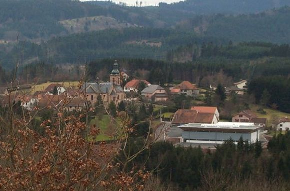 Village de Plaine